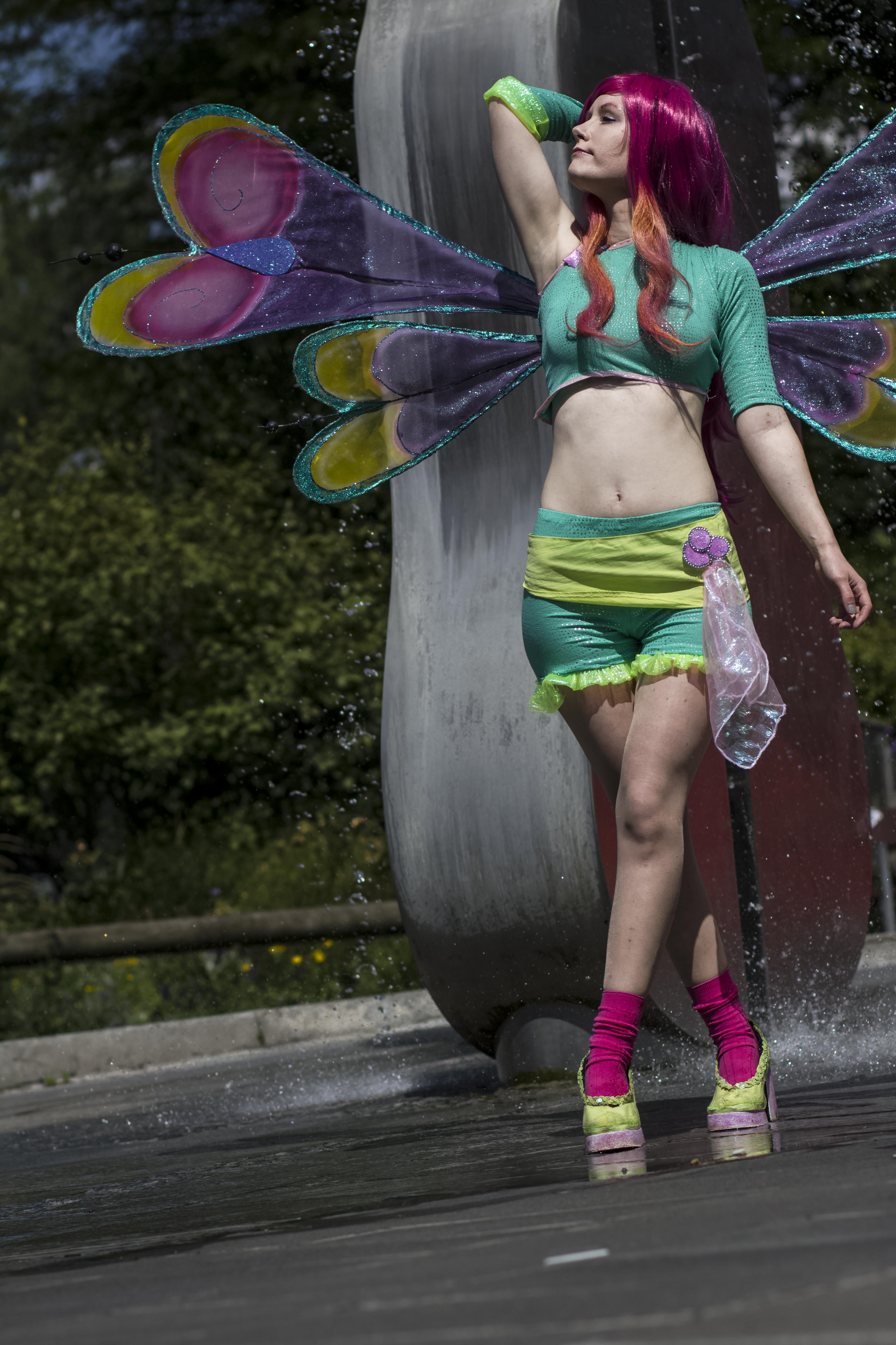 Roxy (Believix)